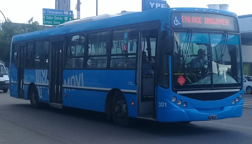 Mercedes-Benz de la empresa Movi, explotadora de la línea Enlace Irigoyen